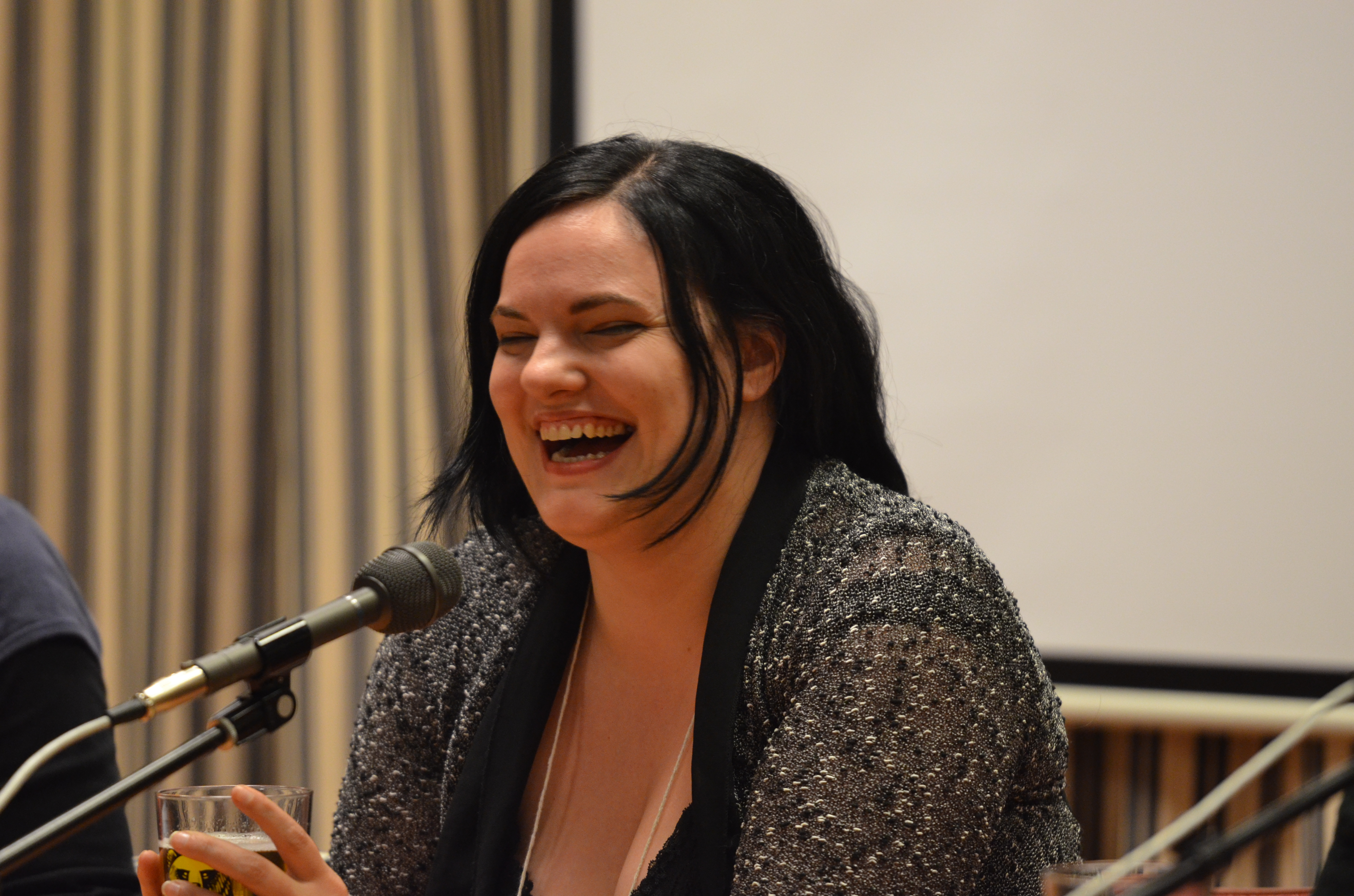 Catherynne M. Valente på Åcon 5, 2012.